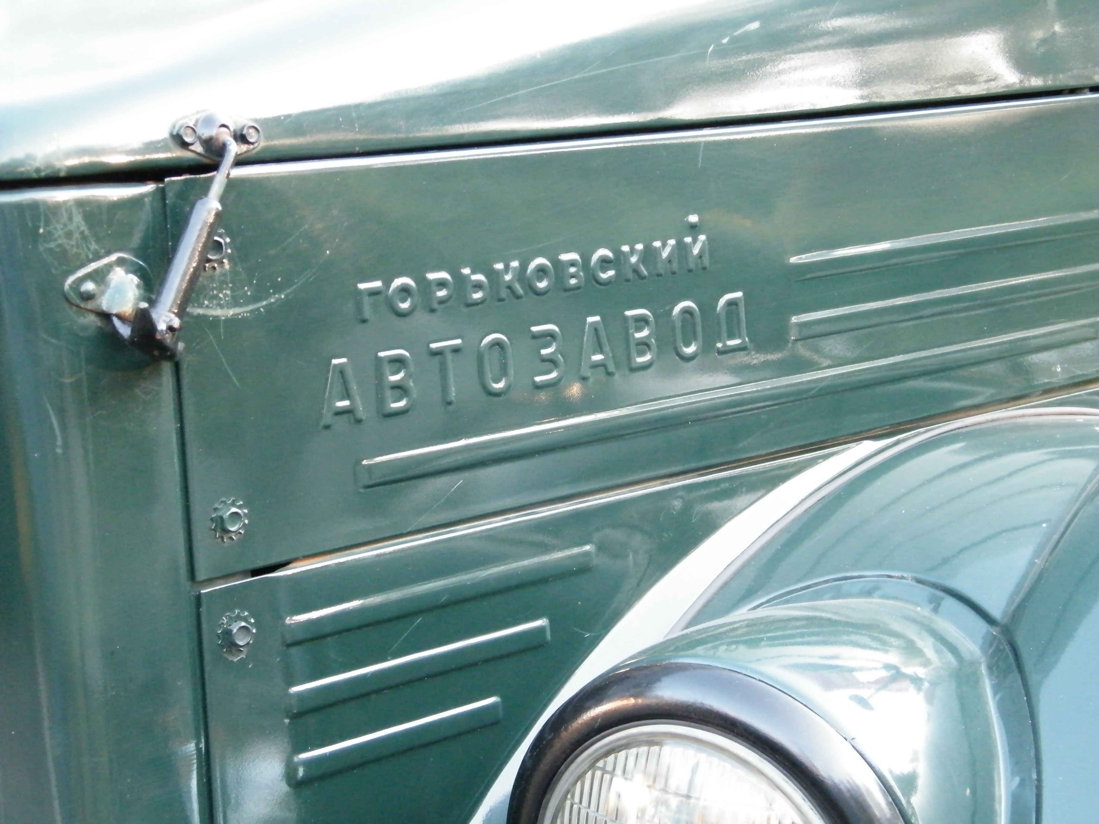 GAZ-51